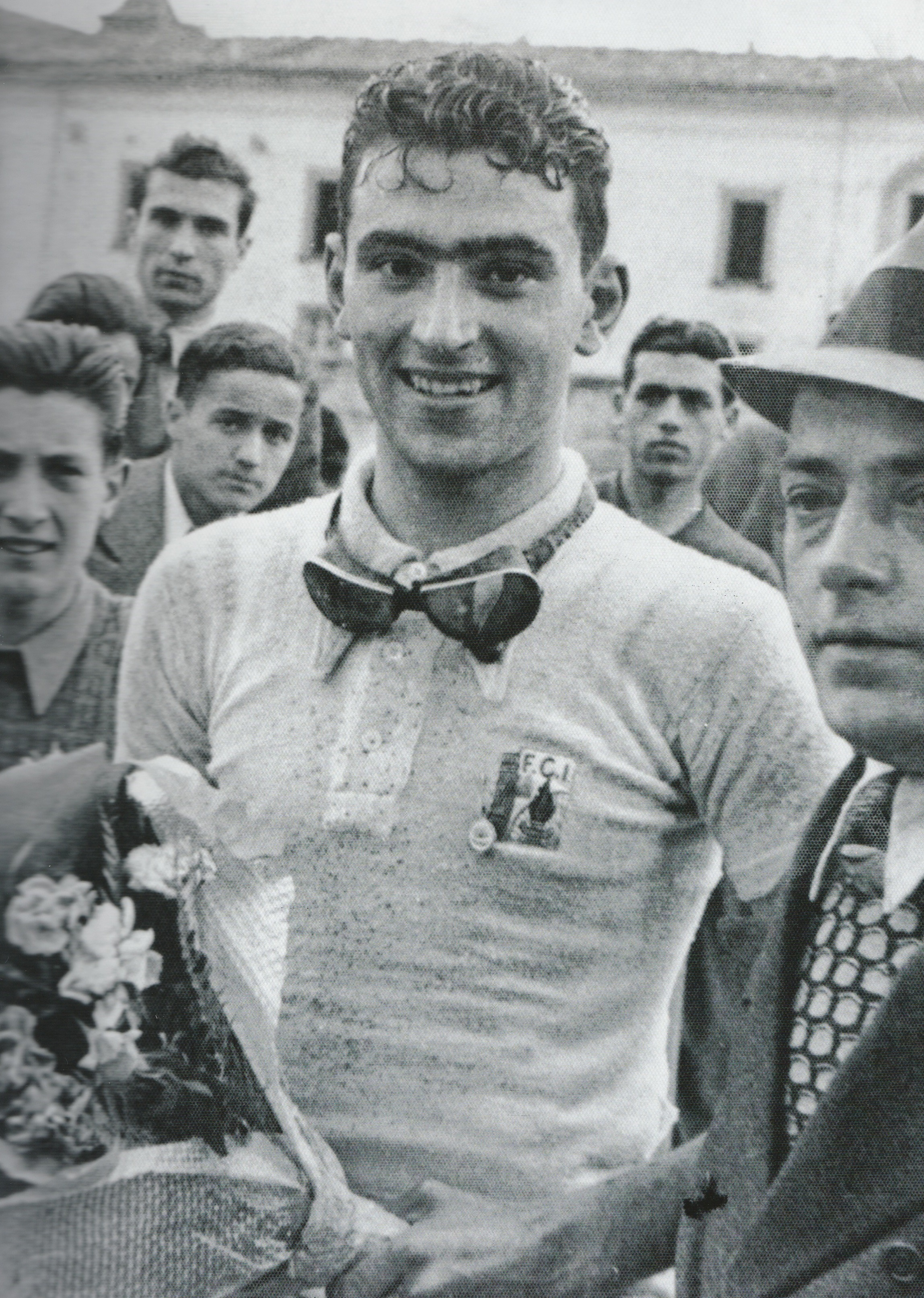 Fiorenzo Magni wins Gran Premio Maino-Coppa Vannacci di Pistoia.